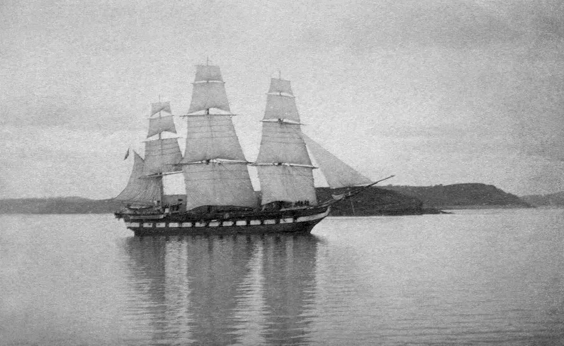 La Galathée, frégate de convoyage dans la rade